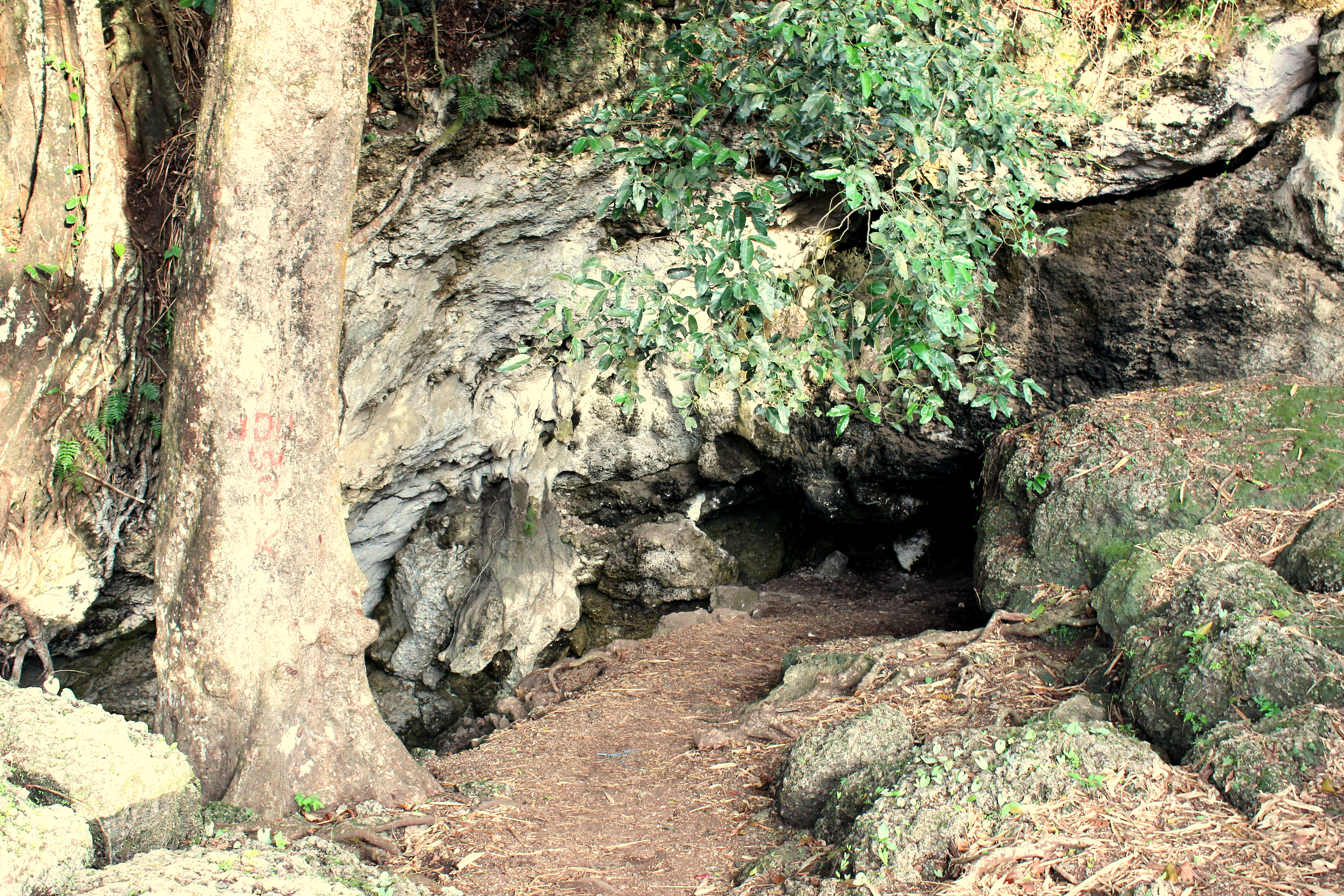 PINTU GOA WAKINAMBORO